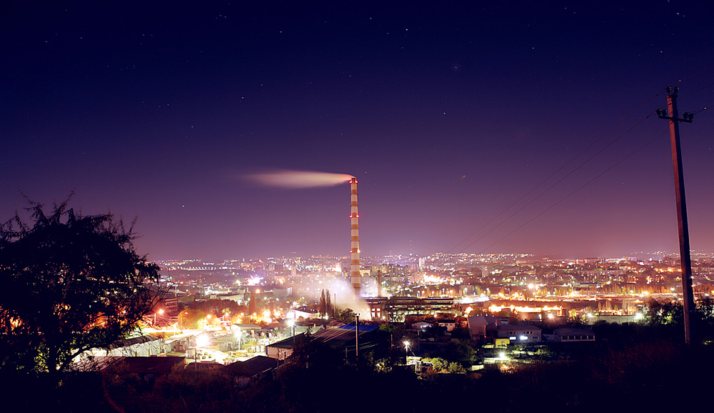 canon 5d mark 2